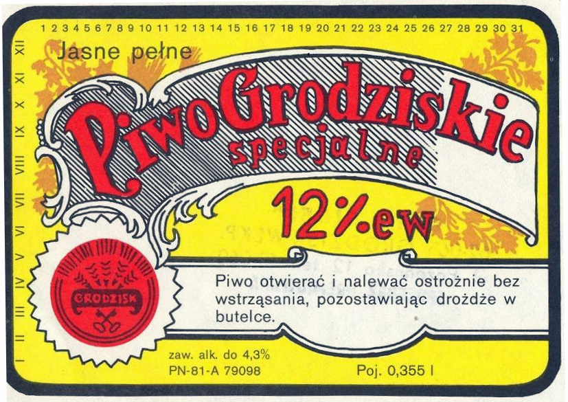 Graetzer Beer